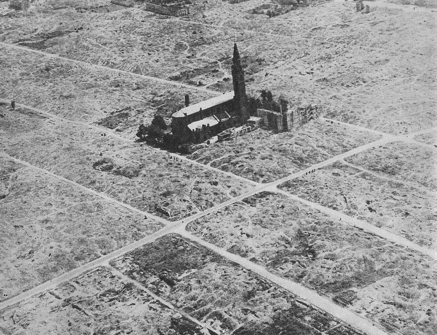 Kościół św. Augustyna wśród ruin getta warszawskiego